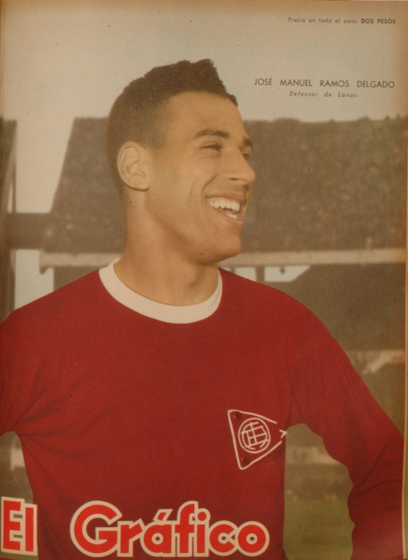 Argentine defender José Ramos Delgado during his time at Club Atlético Lanús.